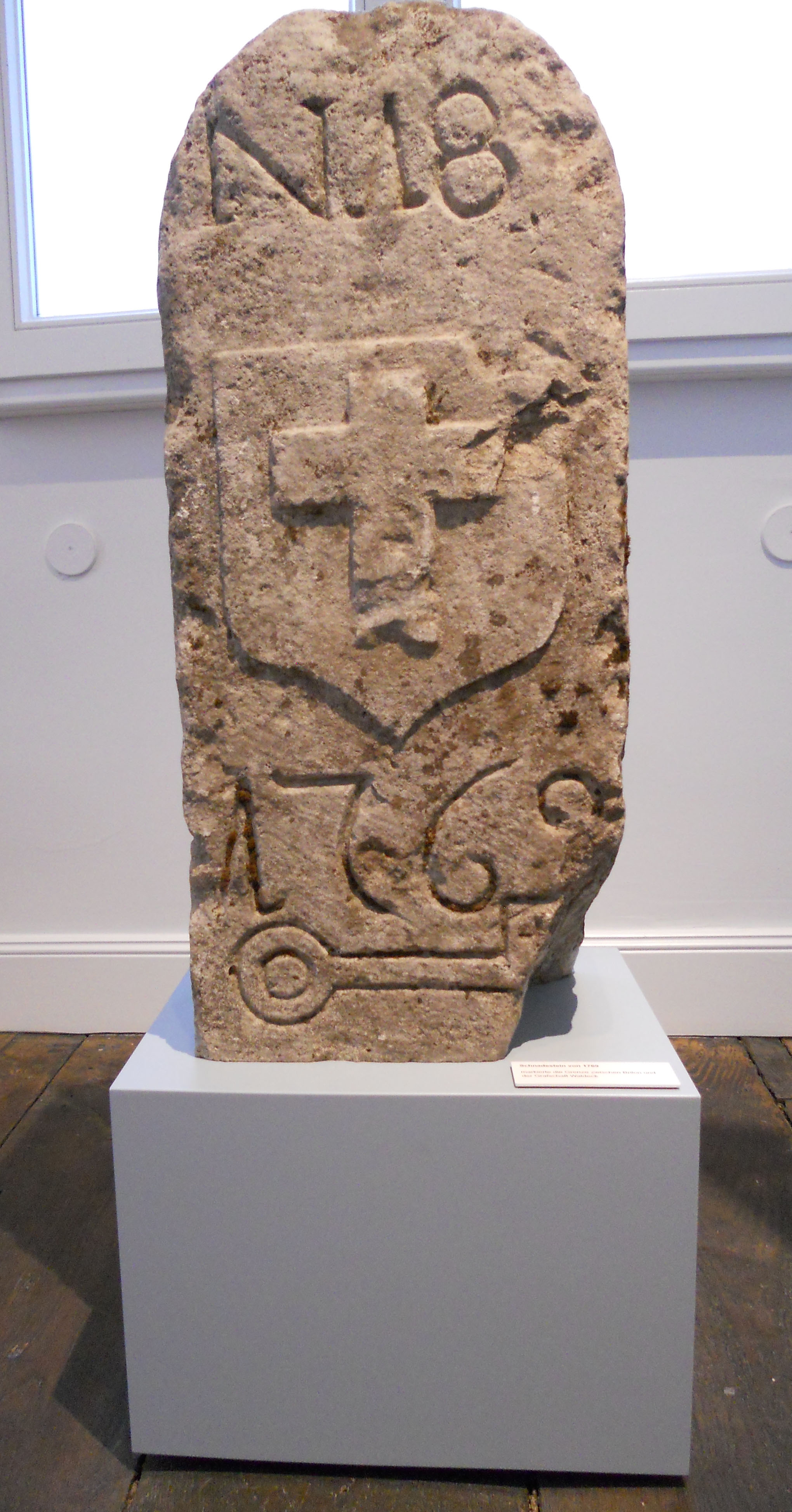 Briloner Schnadestein von 1769